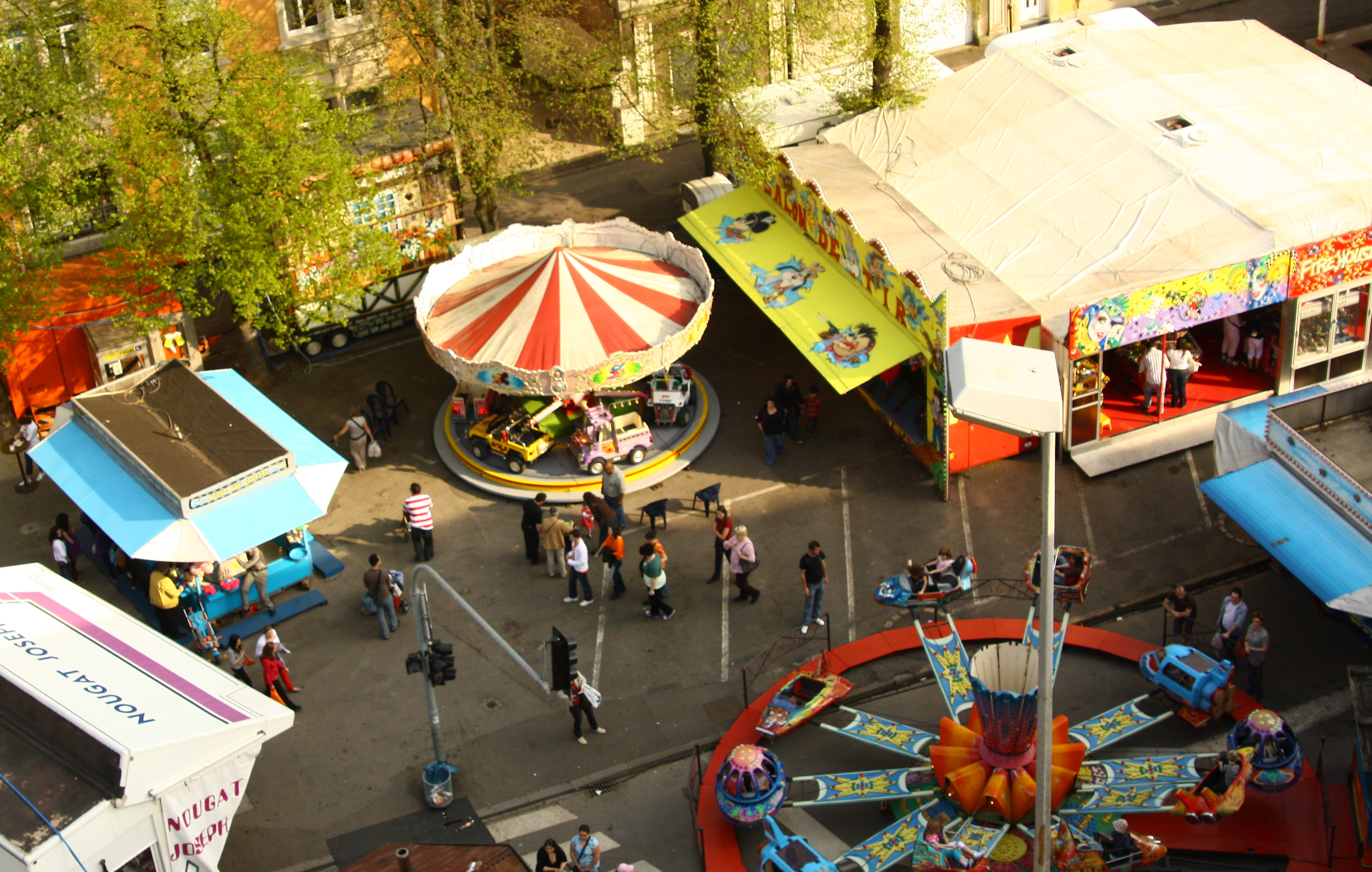 Eng Kiermes vun uewen (Escher Ouschterkiermes).